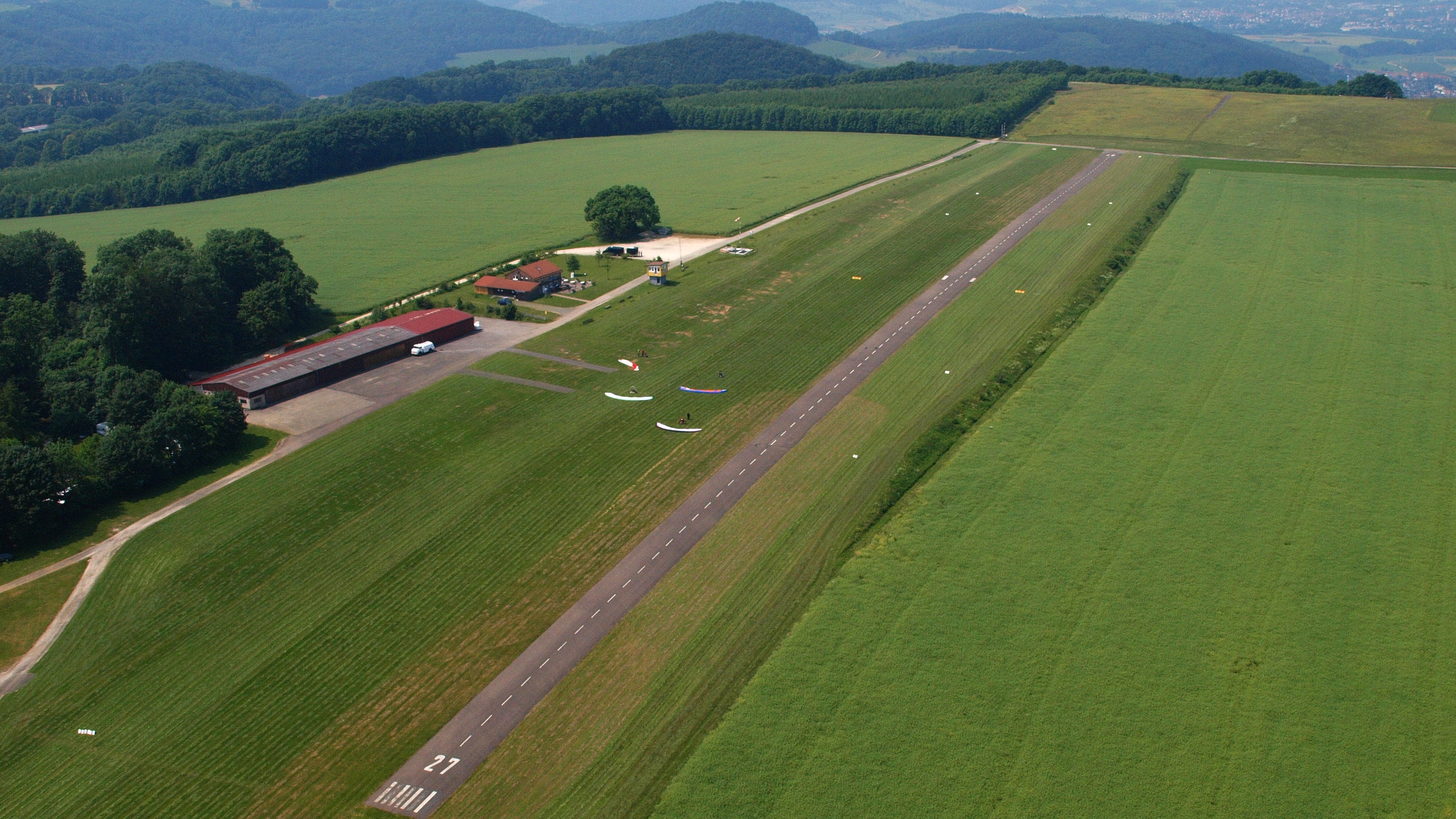 Donzdorf – Flugplatz: Luftaufnahme